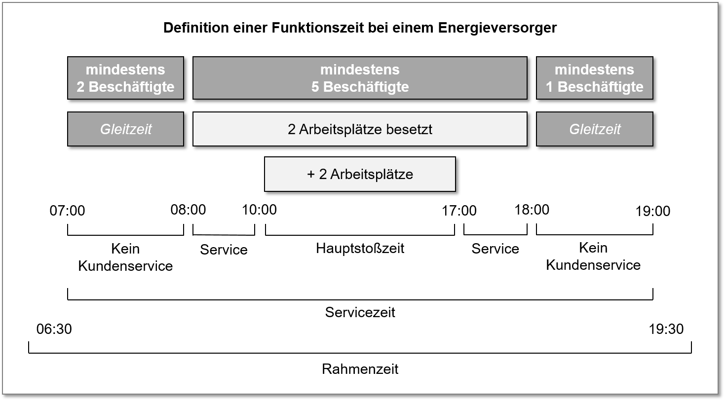 Abgebildet ist eine Illustration einer möglichen definierten Funktionszeit. Zu bestimmten Zeiten sind X Mitarbeiter vorgesehen, die gewisse Funktionen sicherstellen müssen. Dabei ist nicht bestimmt, wer genau zu welcher Zeit da sein muss. Die Gruppe selbst teilt sich diese Zuordnung ein.